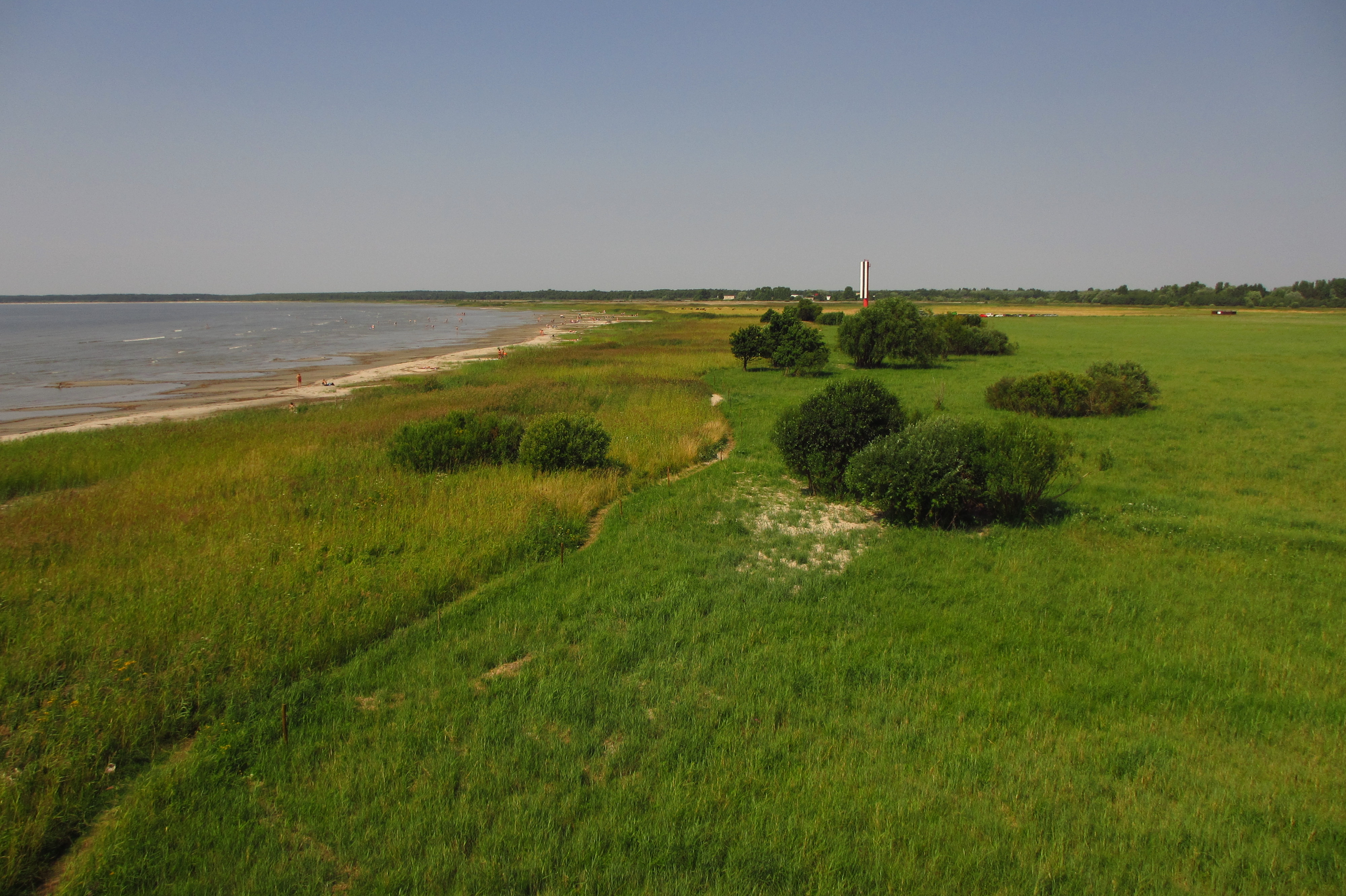 Vaade Pärnu rannaniidu LKA-le Vana-Pärnu vaatetornist.